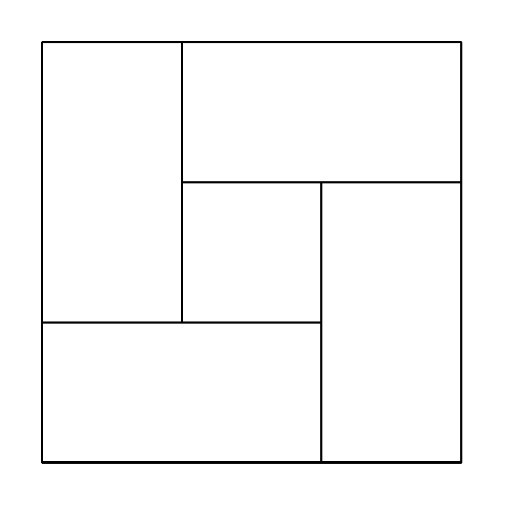 Один из видов рисунка модульного паркета